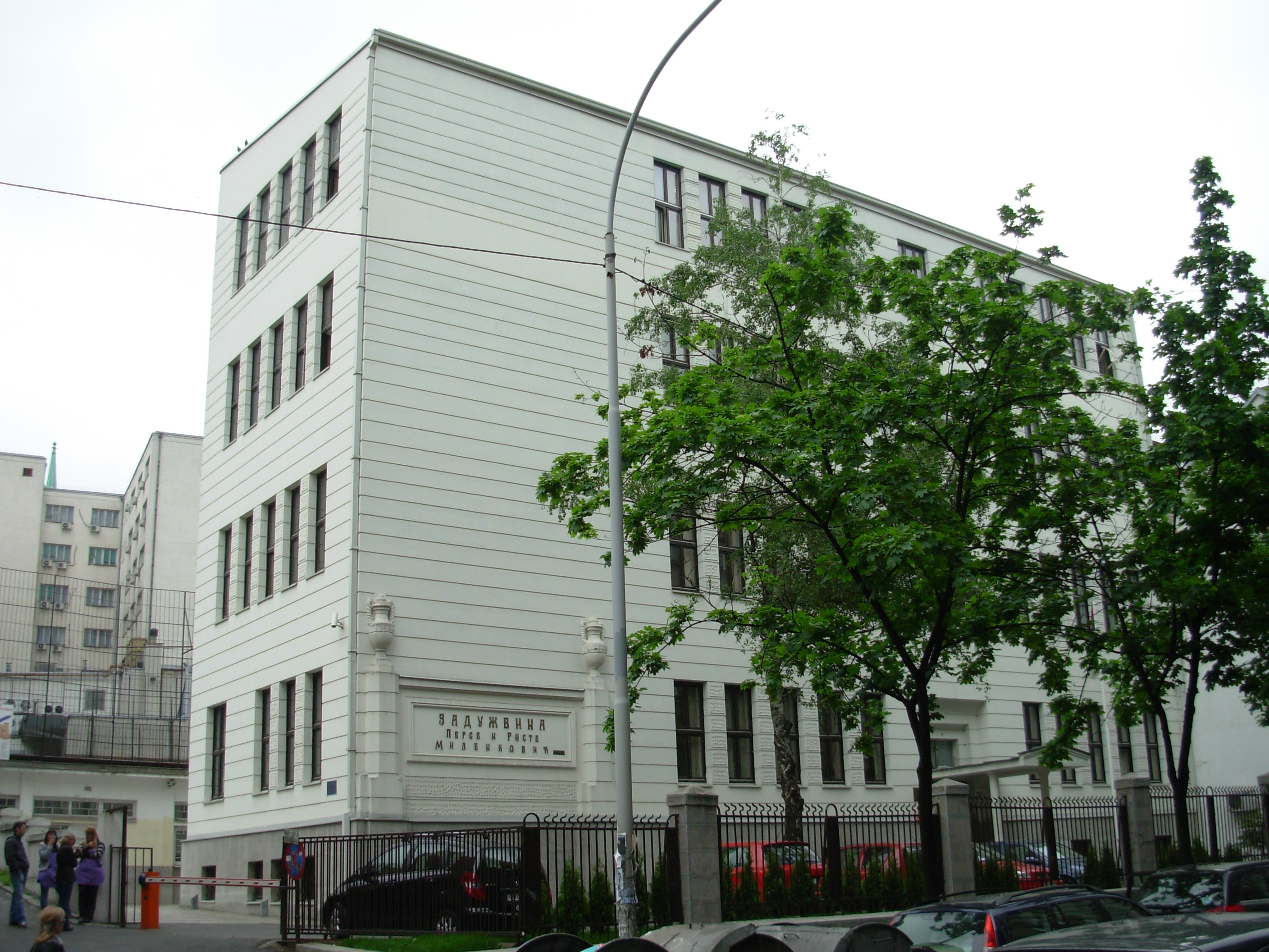 Математичка гимназија у Београду. Сликао Голдфингер.